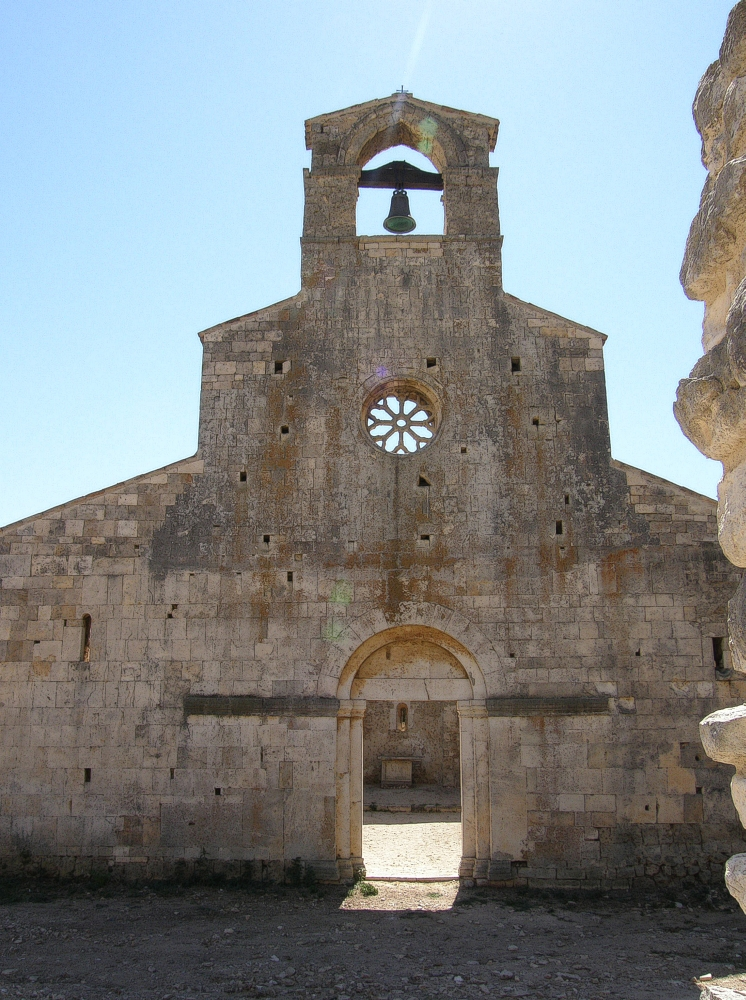 S. Maria di Cartiganano Bussi sul Tirino